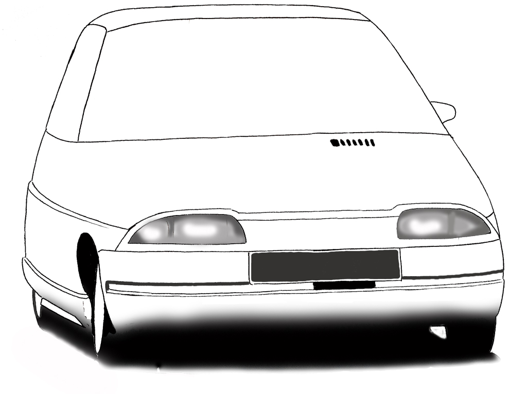 dessin du prototype Renault Vesta 2